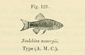 Neolebias ansorgii